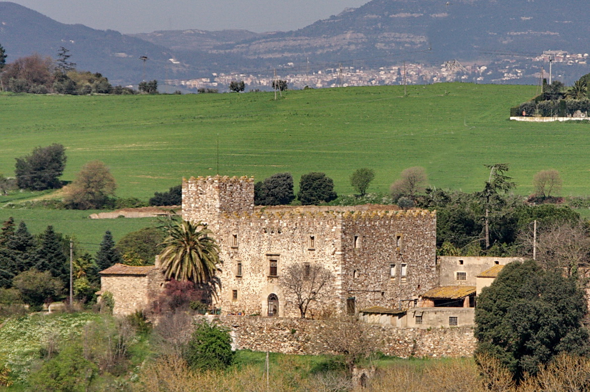 Torre de Seva (segle XIV), ubicada a Marata, les Franqueses del Vallès (Vallès Oriental-Catalunya).